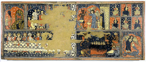 Tabla de san Miguel, realizada por el maestro de Soriguerola a finales del siglo XIII Conservada en el Museo Nacional de Arte de Cataluña